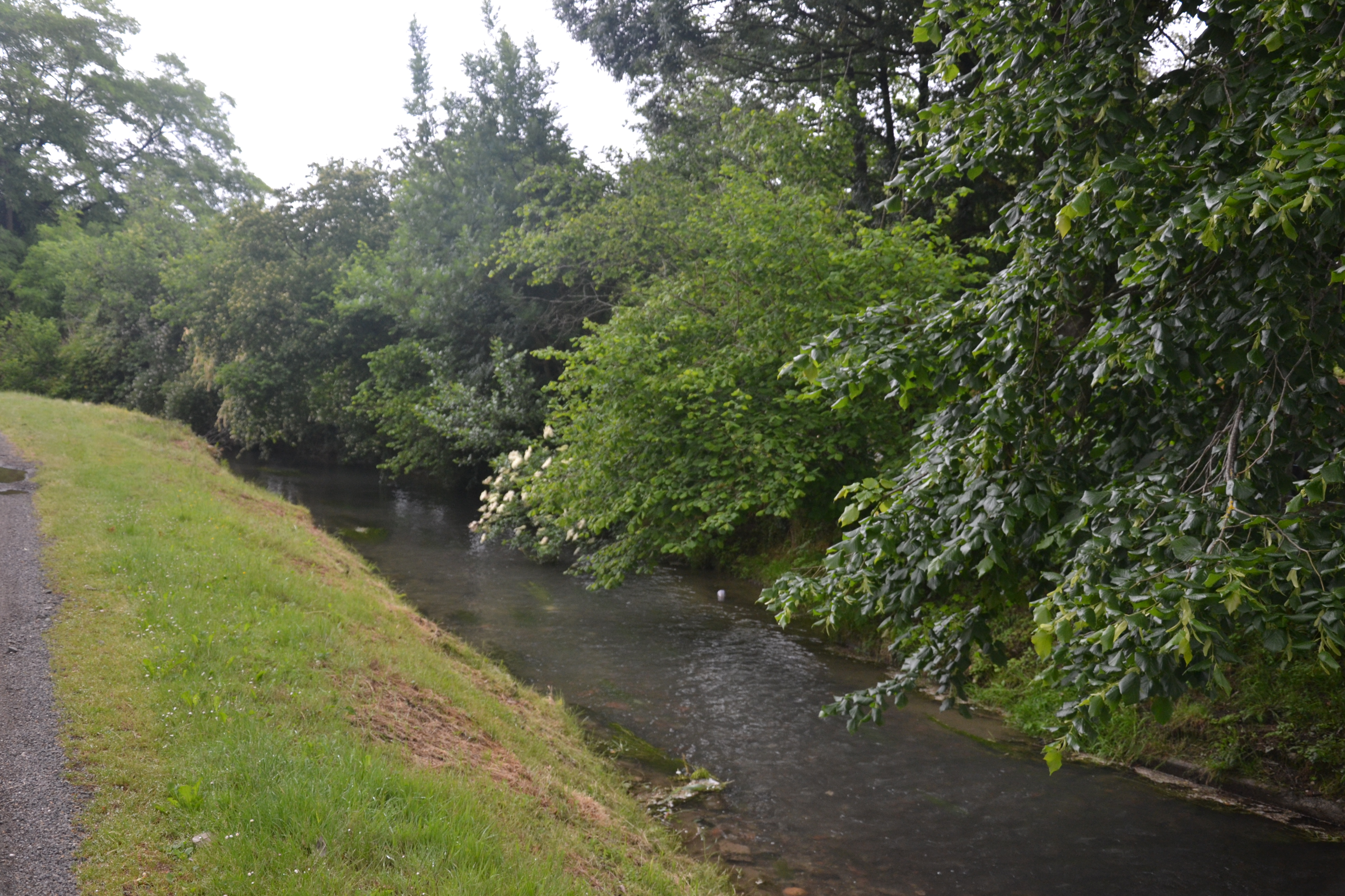 canal d'Alaric à Préchac sur Adour